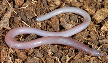 Anelytropsis papillosus (Dibamidae).